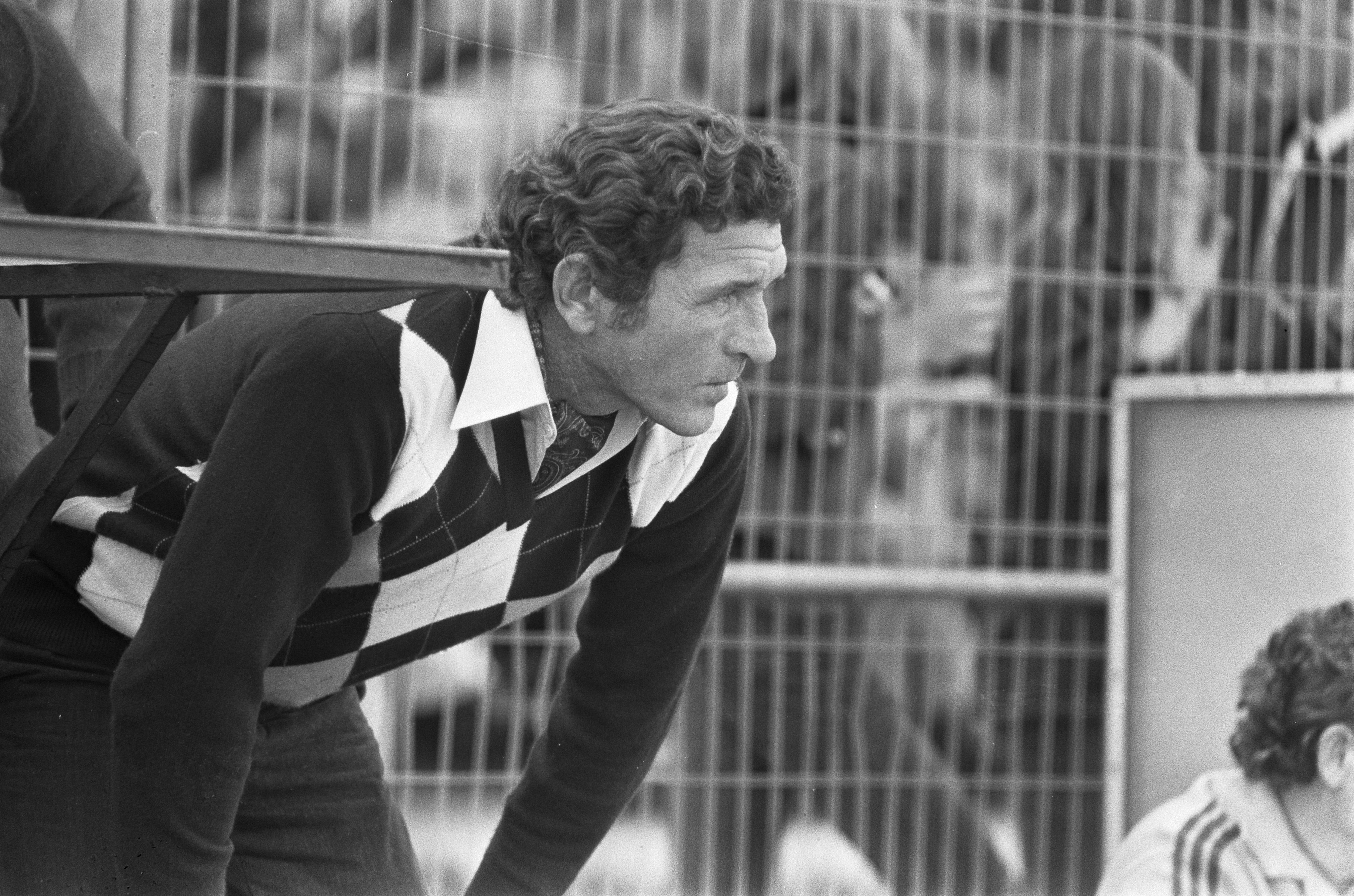 Collectie / Archief : Fotocollectie Anefo Reportage / Serie : [ onbekend ] Beschrijving : Oefeninterland Nederland tegen Argentinie 4-1; nr. 7, 8 trainer Cap (Argentinie), nr. 9, 10 Jongbloed juichend Datum : 26 mei 1974 Trefwoorden : sport, trainers, voetbal Fotograaf : Verhoeff, Bert / Anefo Auteursrechthebbende : Nationaal Archief Materiaalsoort : Negatief (zwart/wit) Nummer archiefinventaris : bekijk toegang 2.24.01.05 Bestanddeelnummer : 927-2149